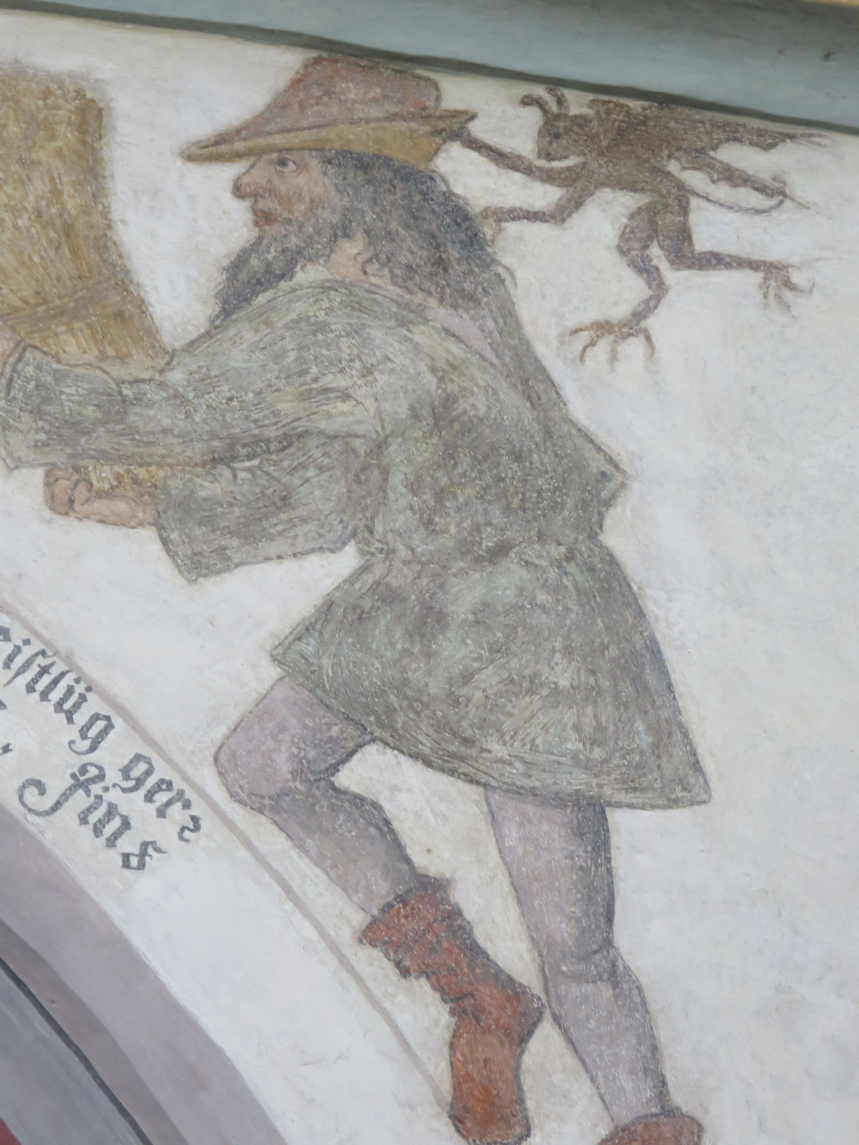 Spätgotische Wandmalerei ,Kain mit dem Teufel